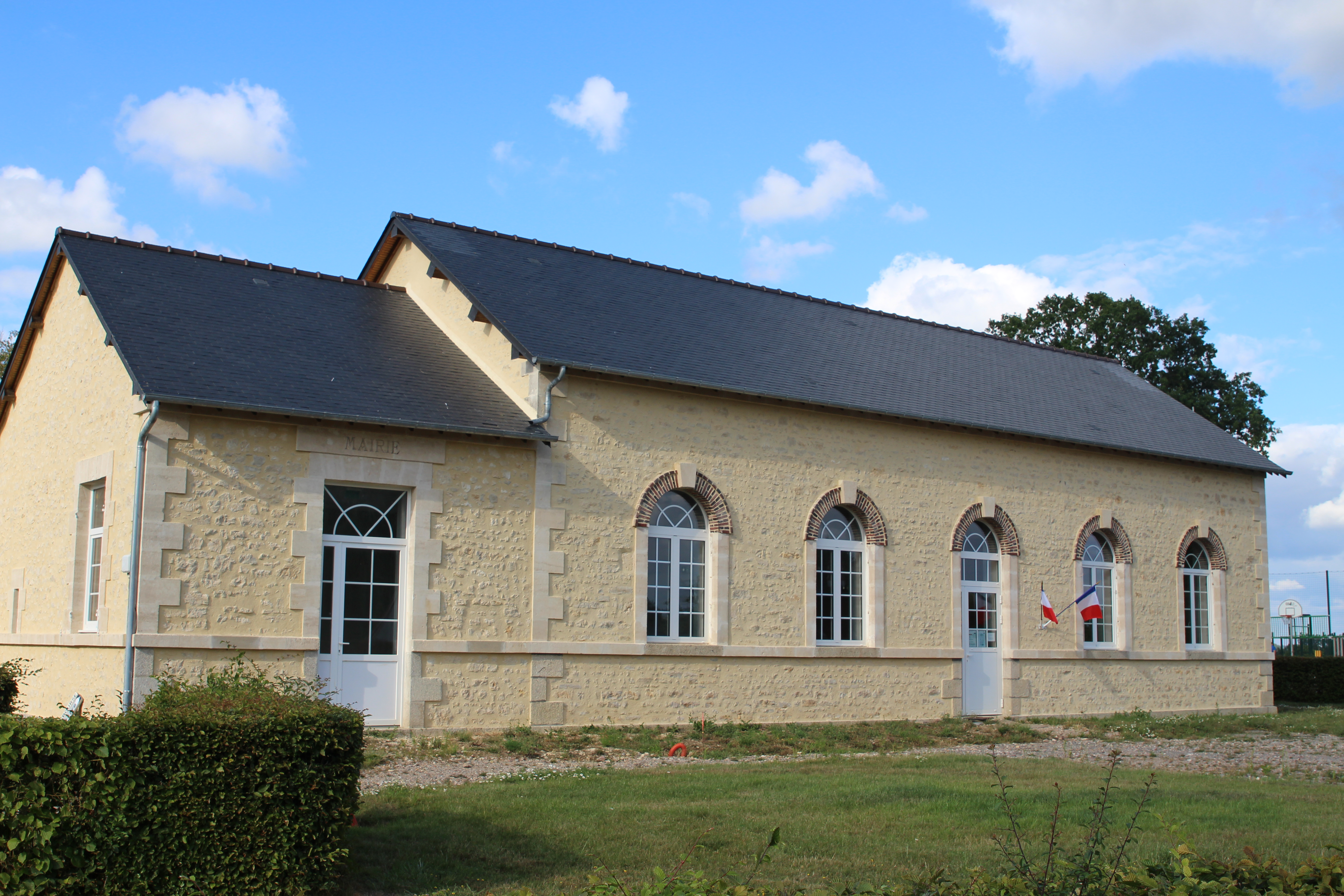 Les Ventes-de-Bourse, Orne